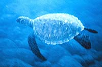 A sea turtle.